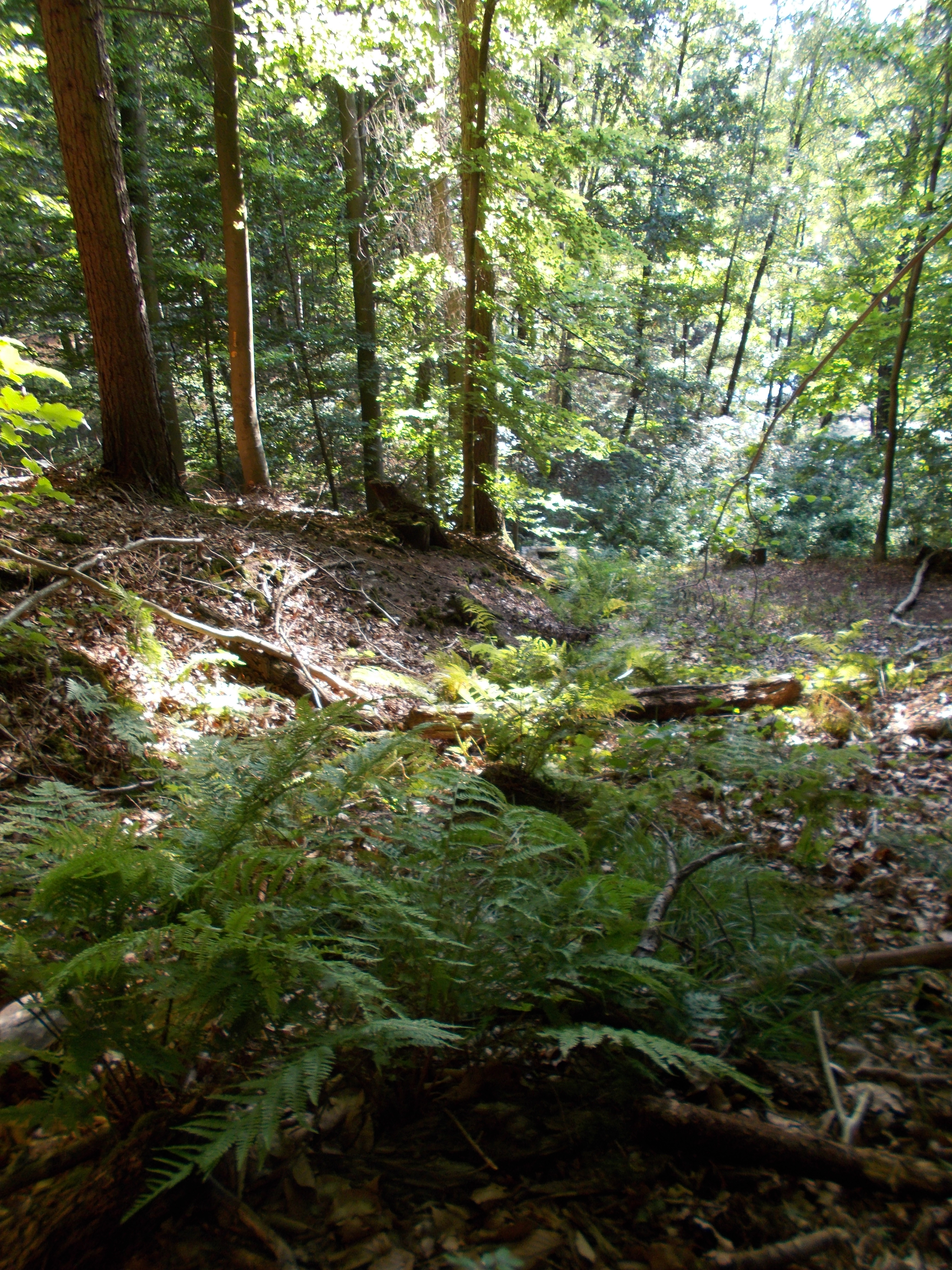 Quellhang der Drususquelle am Flirenberg in der Hees (Xanten). ND 4 Sonsbeck / Xanten (Kreis Wesel).